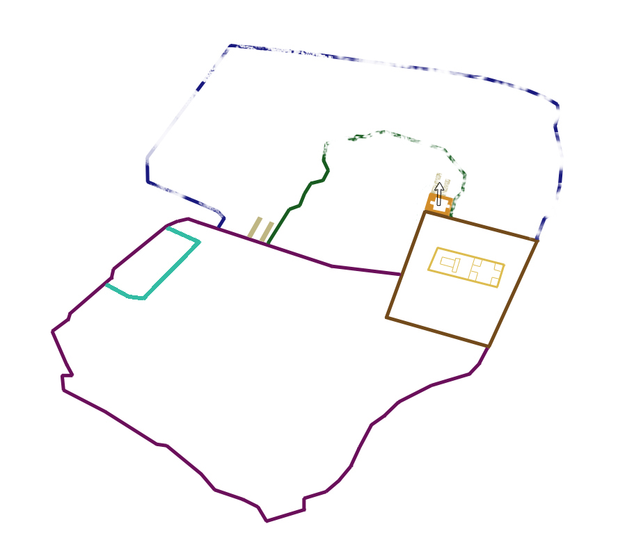 ירושלים 70 - מיטוט הסוללות באמצעות המנהרות